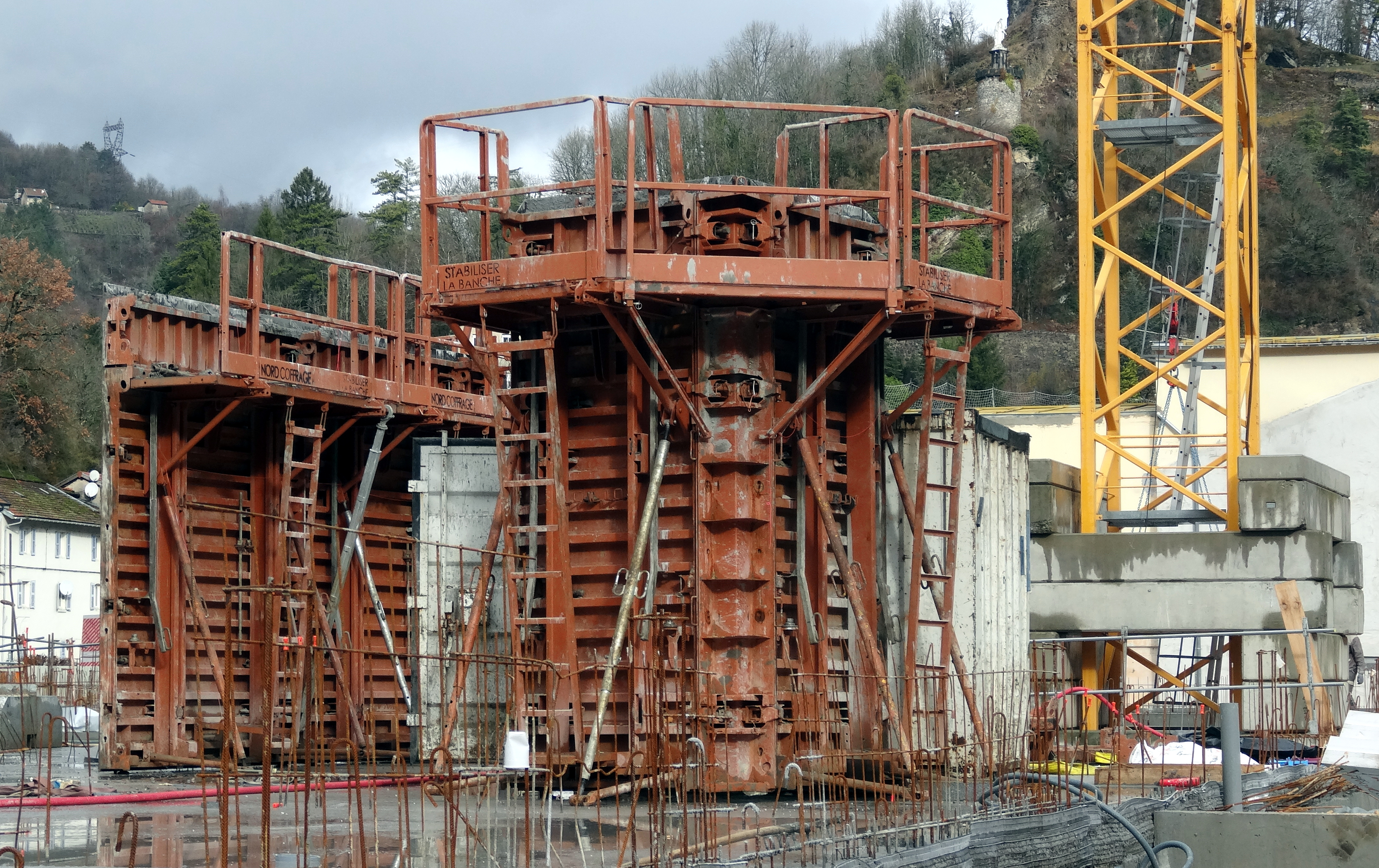 Coffrages métalliques